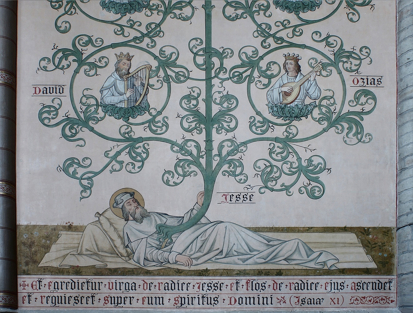 Muurschildering, omstreeks de overgang van de 19-de naar de 20-ste eeuw, op de zuidelijke koormuur anoniem aangebracht door een onbekende schilder.